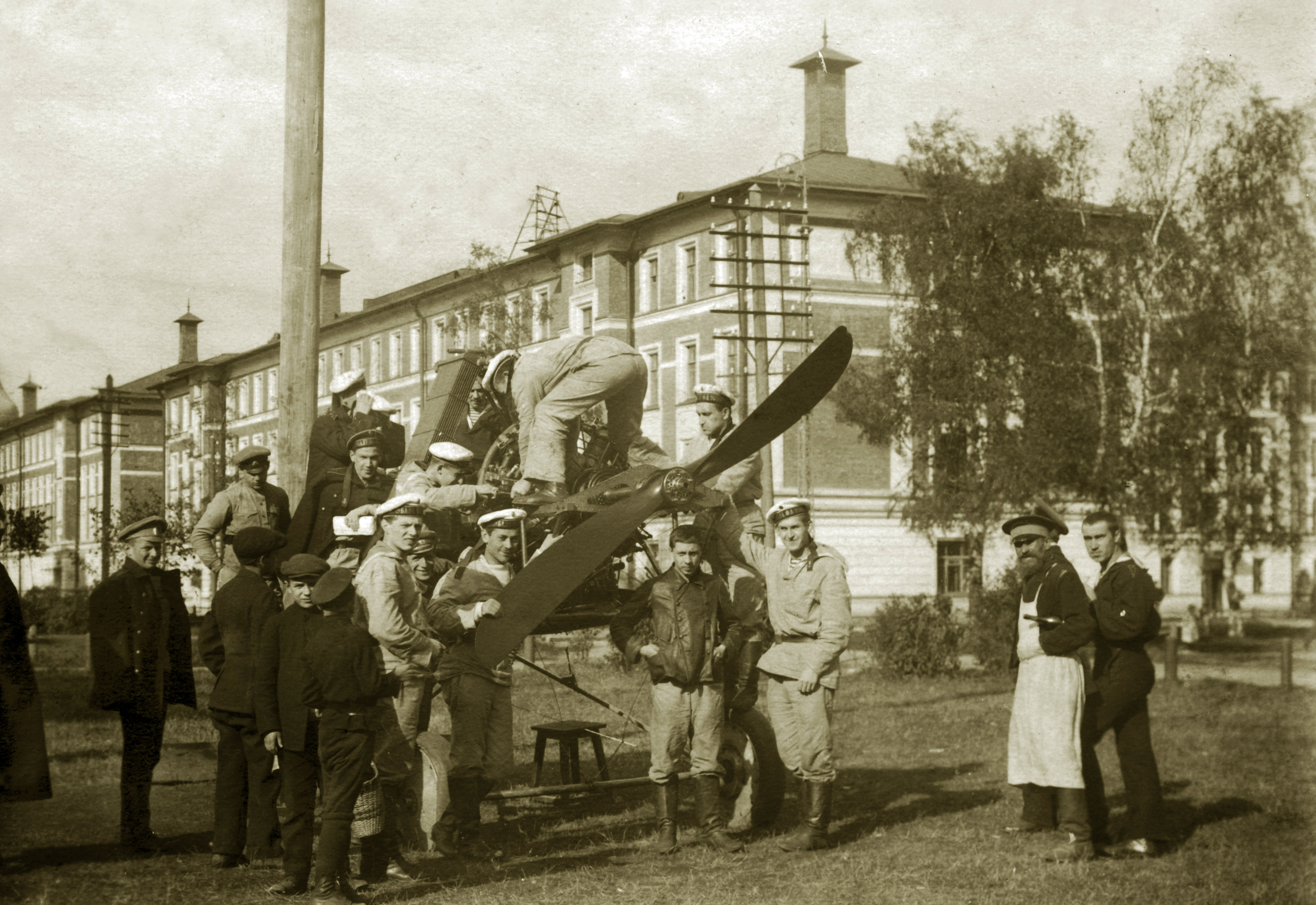 Занятие на Теоретических курсах Офицерской школы морской авиации при Политехническом институте в Петрограде перед отправкой в БОШМА. Павел Депп в бескозырке стоит первым слева у винта. Адрес в 2016 году: ул. Гидротехников д. 29б - Первый учебный корпус СПбПУ